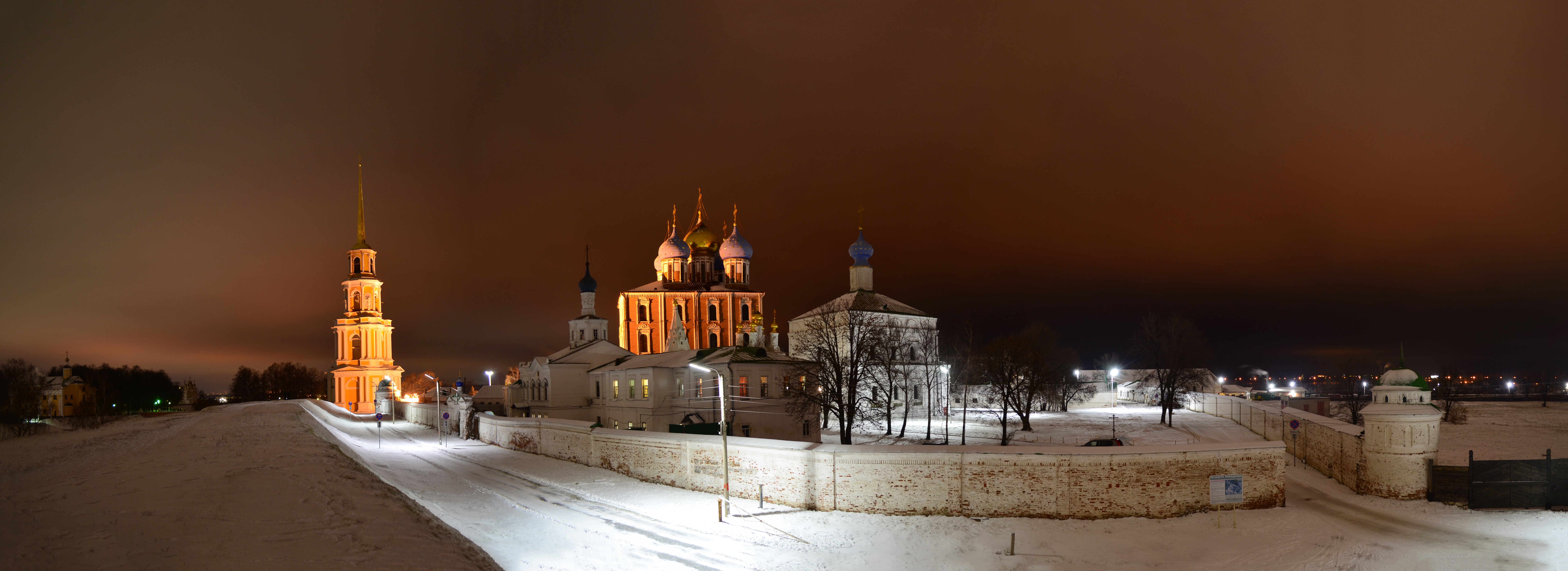 Ночная Рязань.